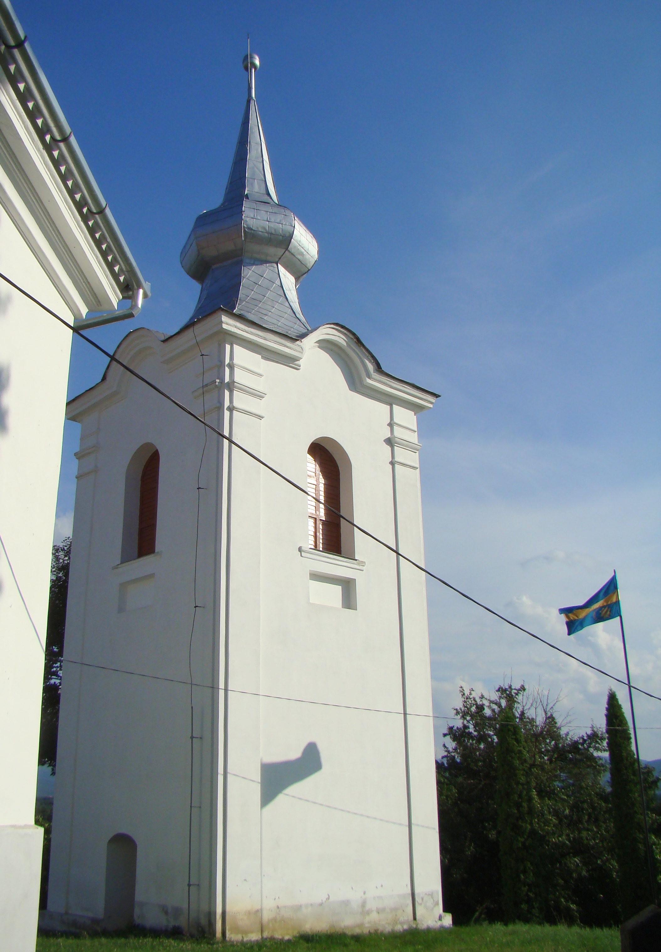 Turn-clopotniță, sat Reci; comuna Reci Pe un deal, la marginea nord-est a localității, lângă cimitir sec. XIII,1515, transf. 1857 02